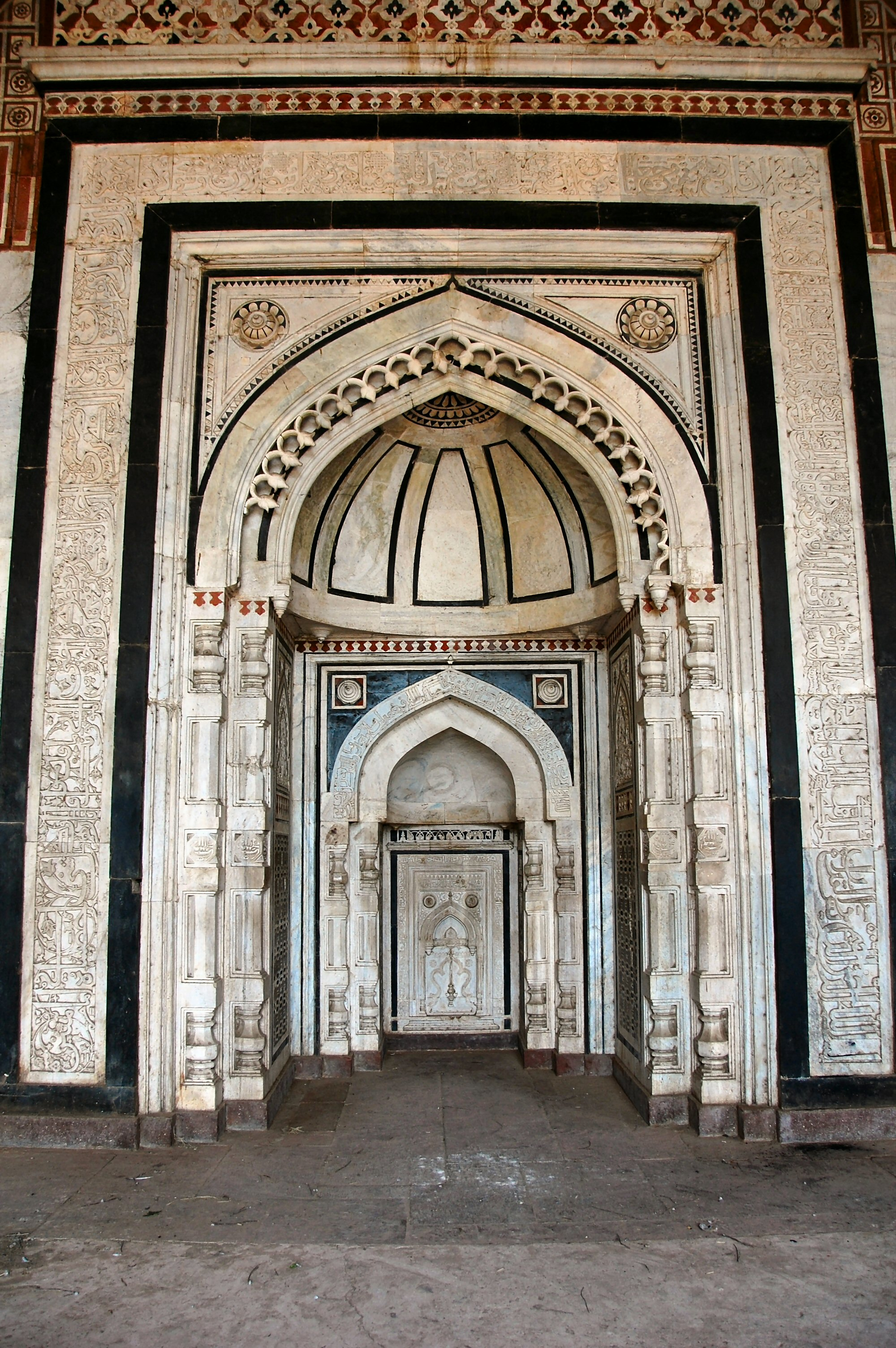 Mihrab in Qila Kuhna Masjid, Purana Qila, Delhi.